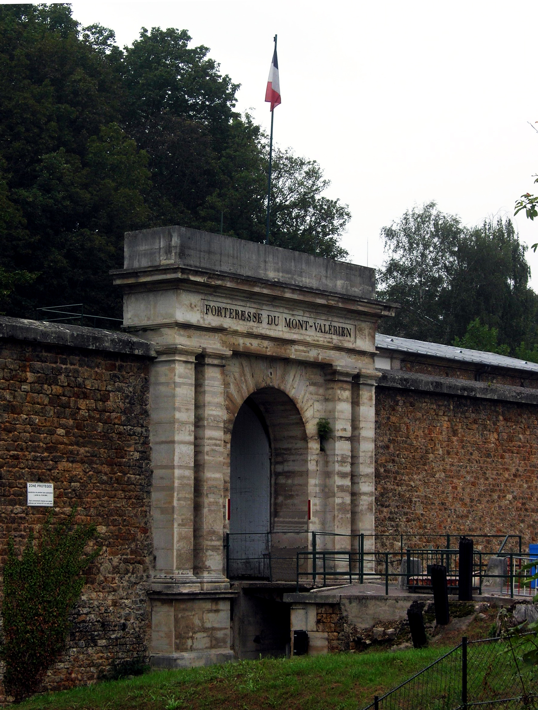 Description =Entrée du fort du mont Valérien à Suresnes Source =Photo taken by Remi Jouan Date =Novembre 2005 Author =Remi Jouan